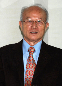 한국어 (조선): 김병옥기자